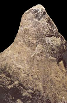 Ši nuotrauka daryta 2003 m. birželio mėn. lankantis Montanoje, JAV, lankantis mineralų muziejuje, tik šiek tiek pakoreguota su programomis, fotografuota su OLYMPUS C-480 fotoaparatu.